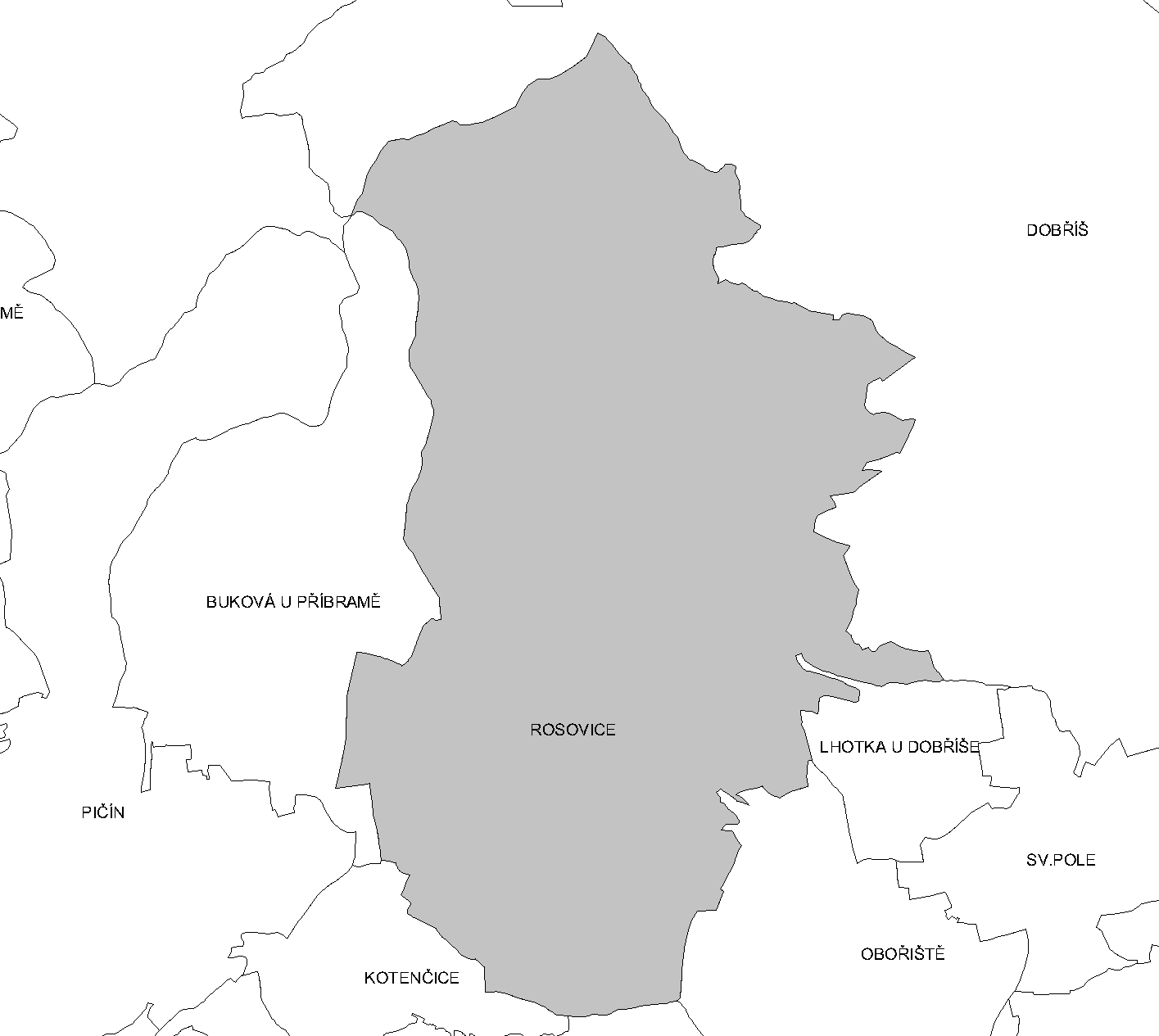 Katastr Rosovic